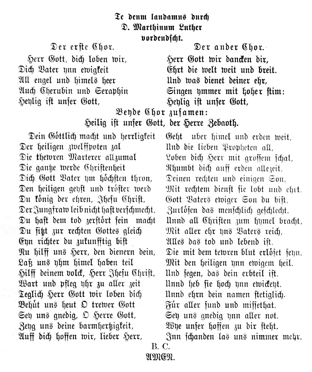 Martin Luther: Reimfassung des Te Deum